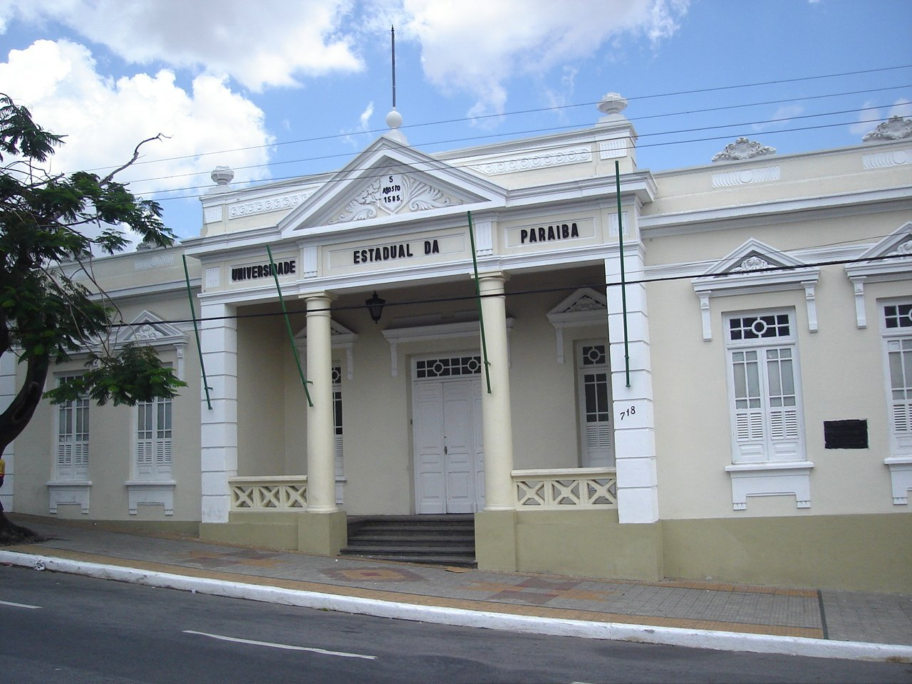 Universidade Estadual da Paraíba - centro, Campina Grande, Brasil.